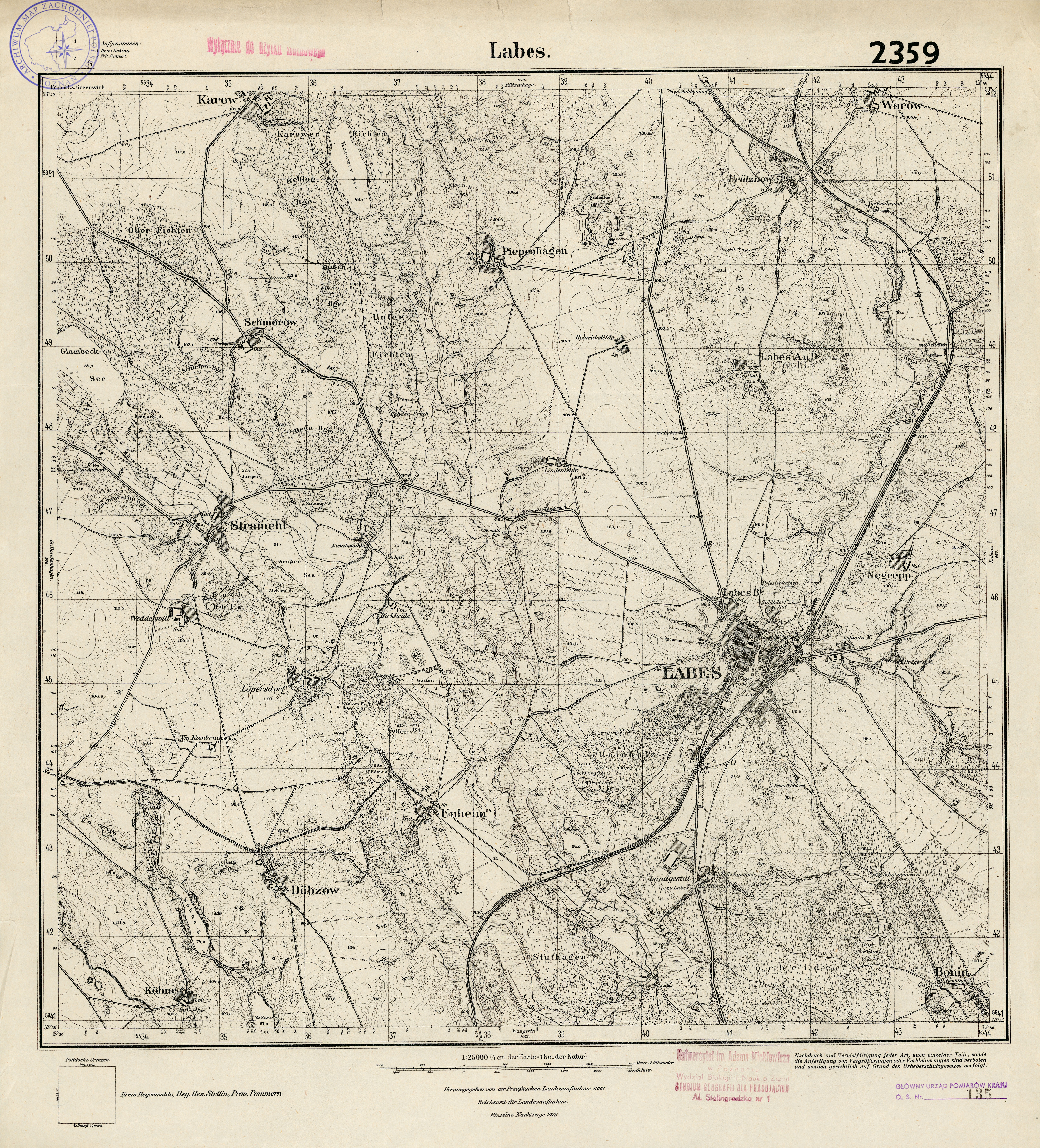 Niemieckojęzyczna mapa okolic Łobza (j. niem. Labes), opublikowana w 1929.